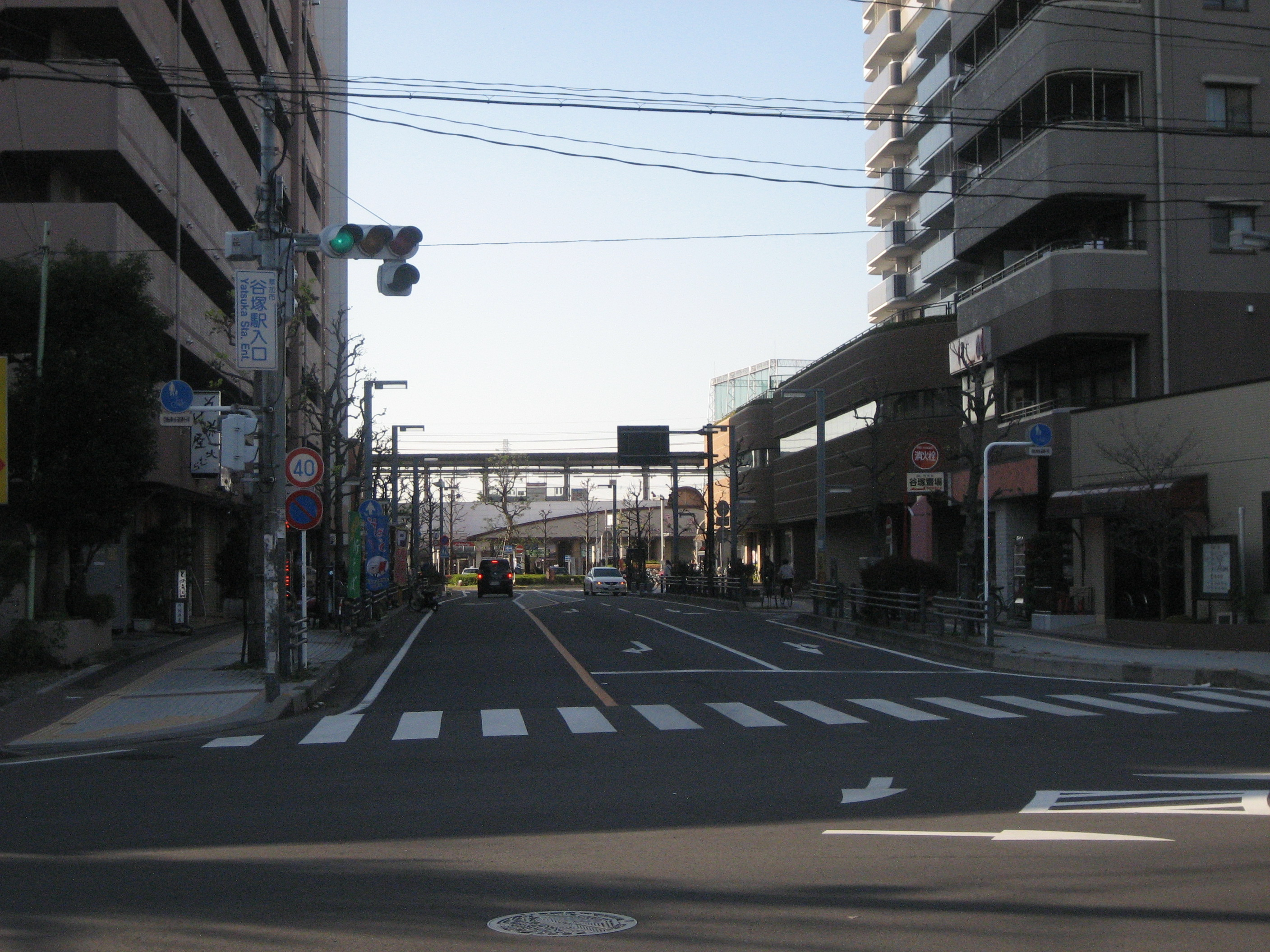 埼玉県道401号線谷塚駅入口交差点付近